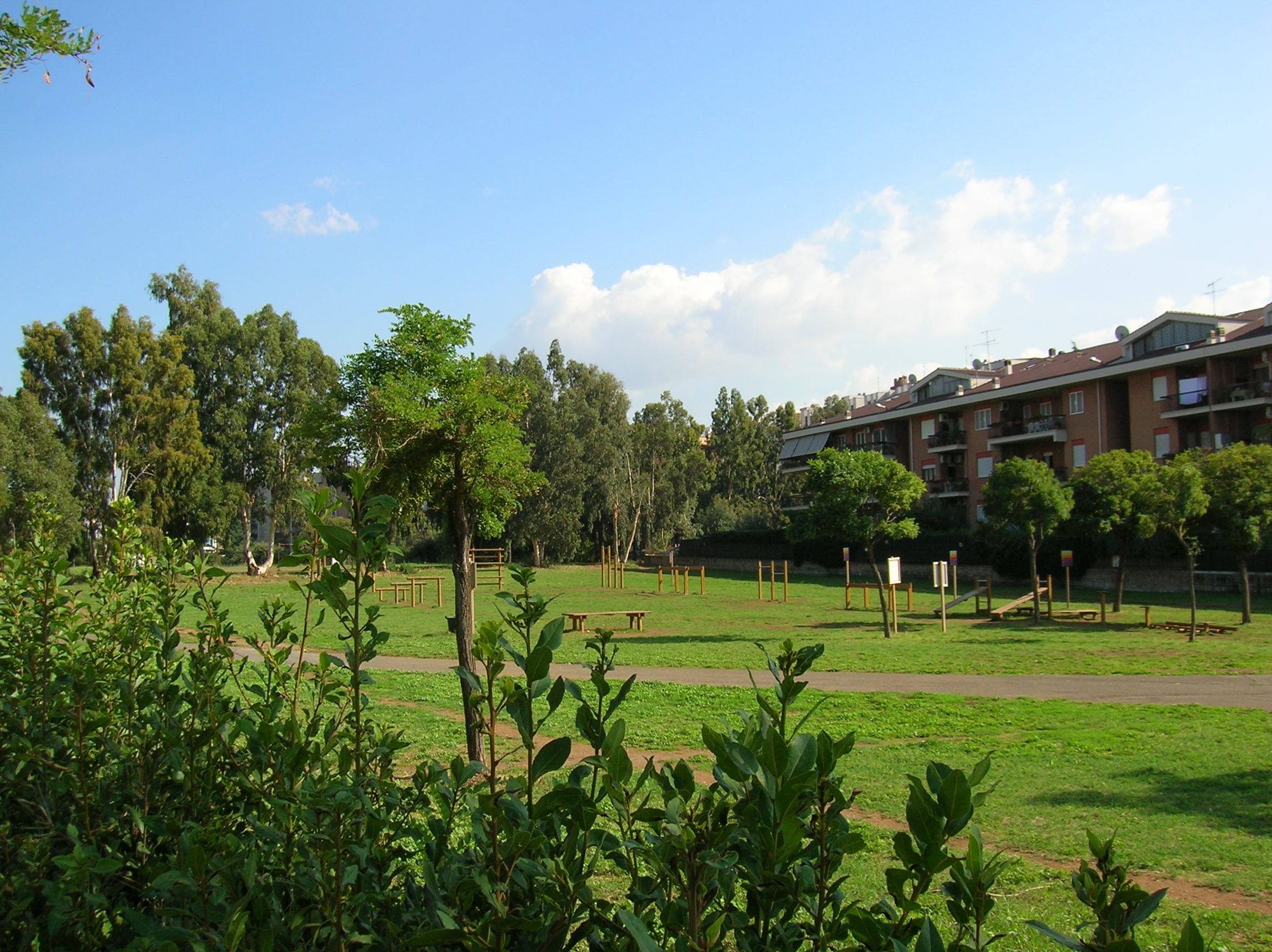 Parco Tor Tre Teste da via Targetti, Roma, Lazio, Italia